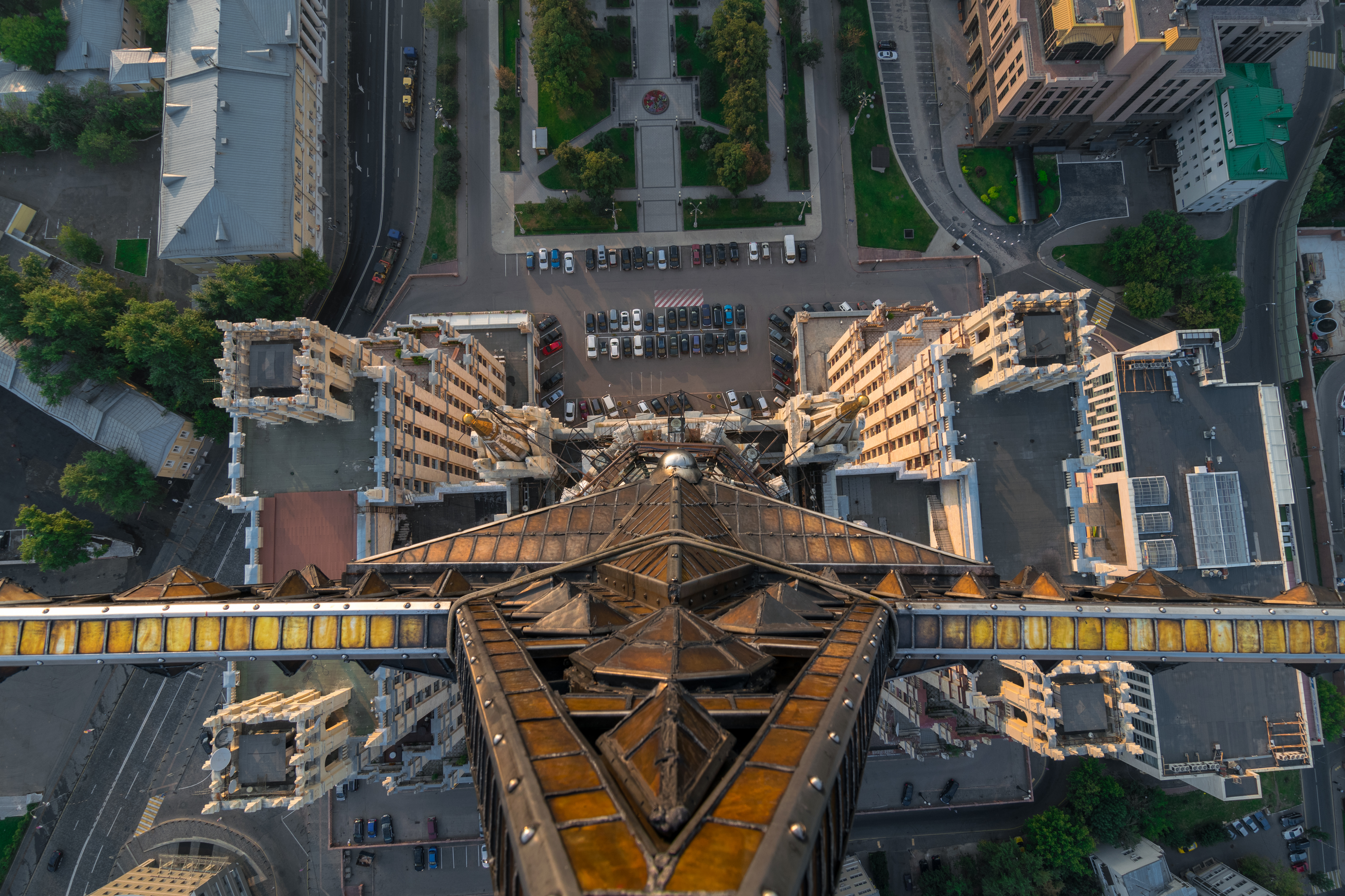 Жилой дом: Кудринская пл., дом 1, Пресненский, Центральный округ, Москва